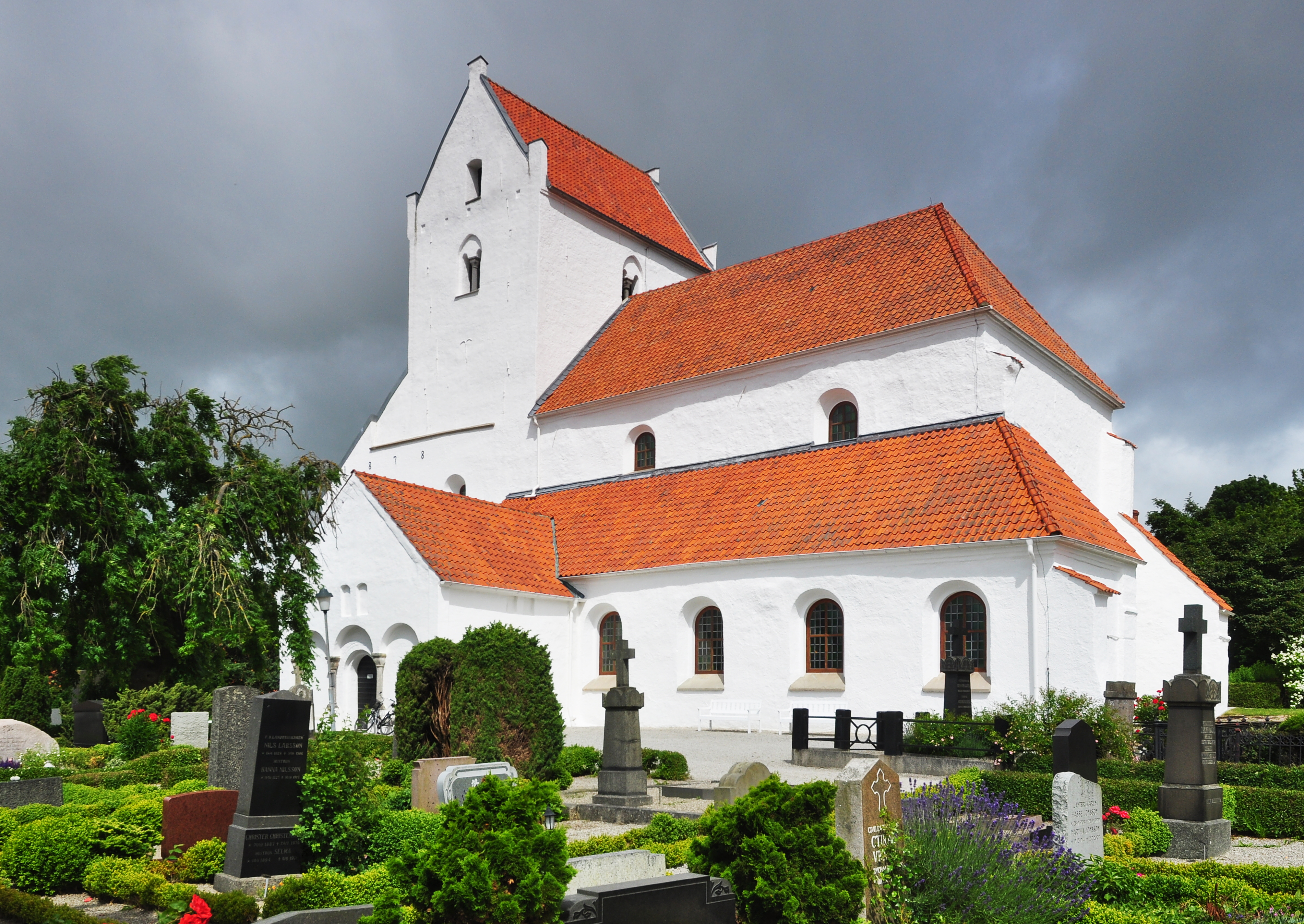 Kyrkan som grundlades 1060, anses vara den äldsta bevarade stenkyrkan i Skandinavien.